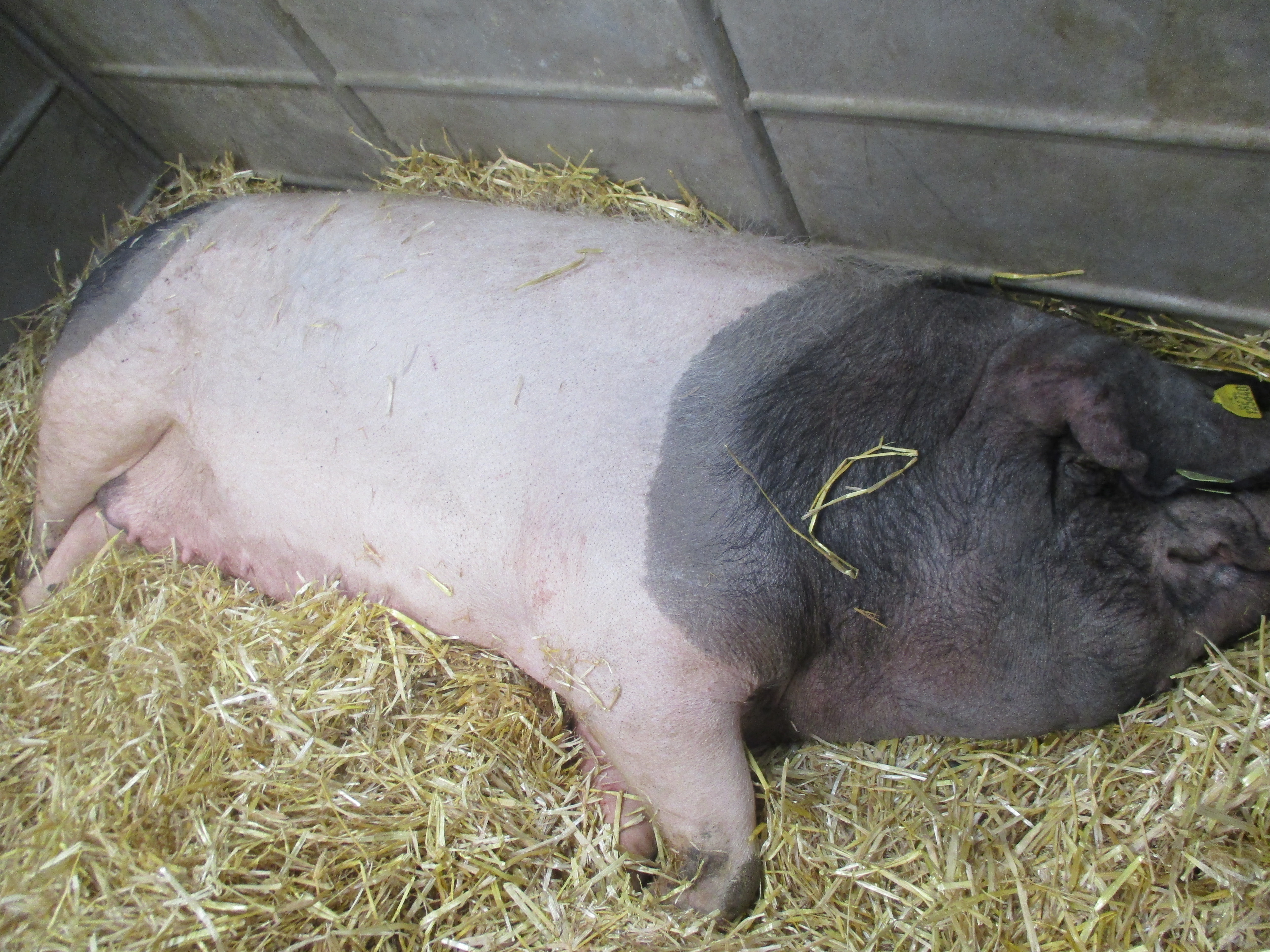 Truie pie noire basque.